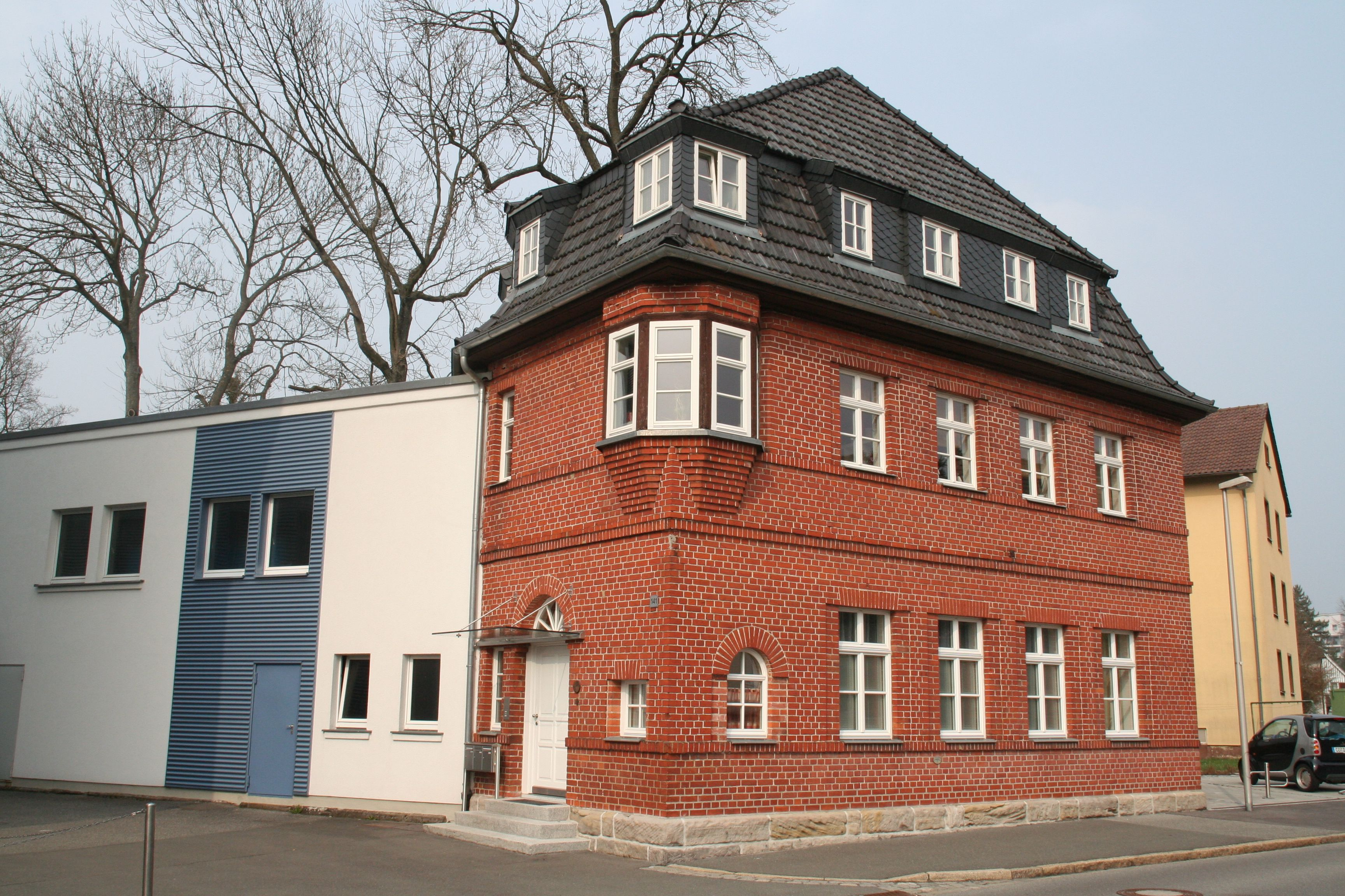 LASCO, Coburg-Cortendorf, Hahnweg 139